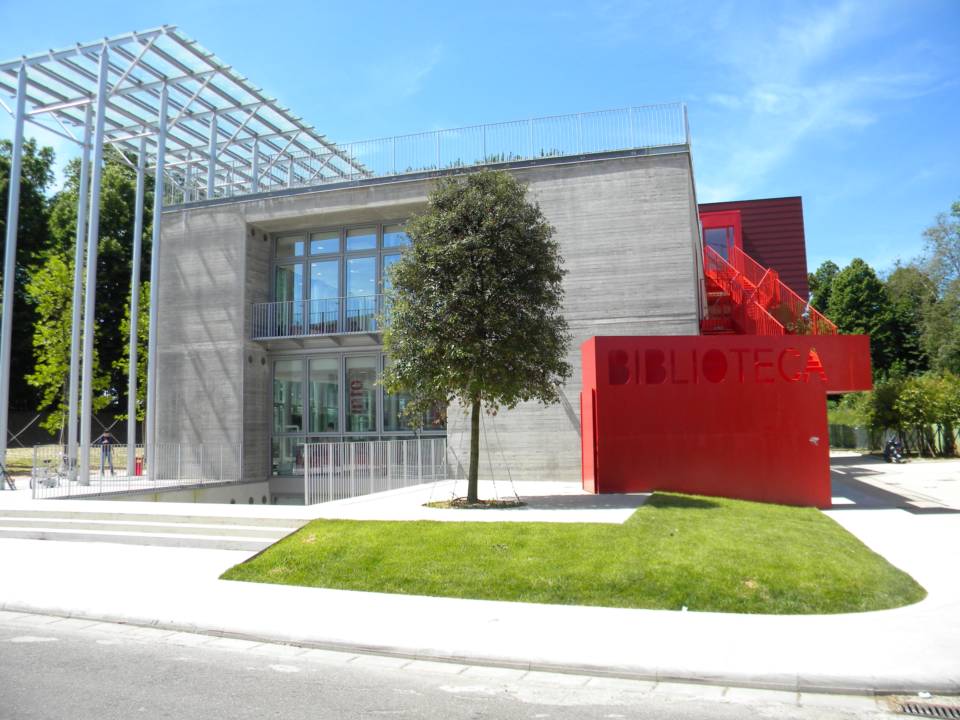 Vista della biblioteca dalla via San Michele degli Scalzi